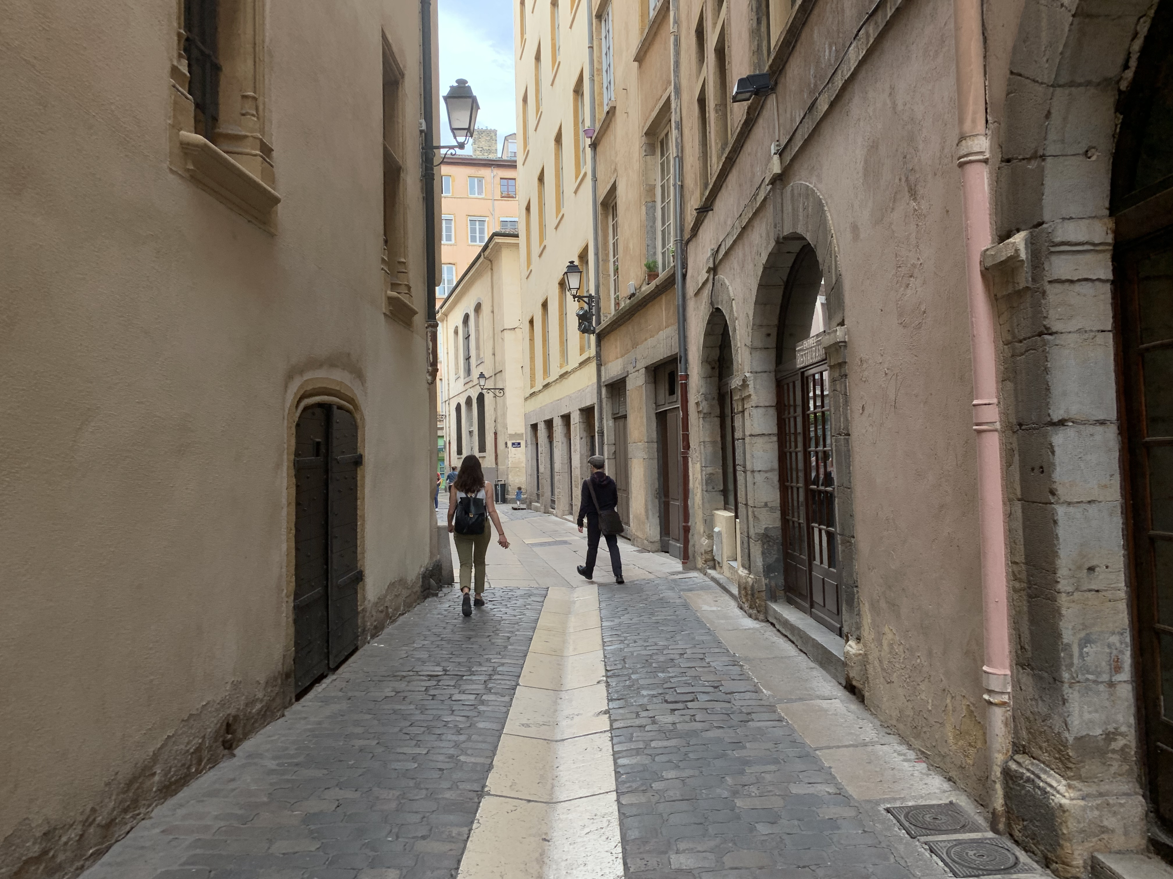 Rue de Gadagne, juin 2019.